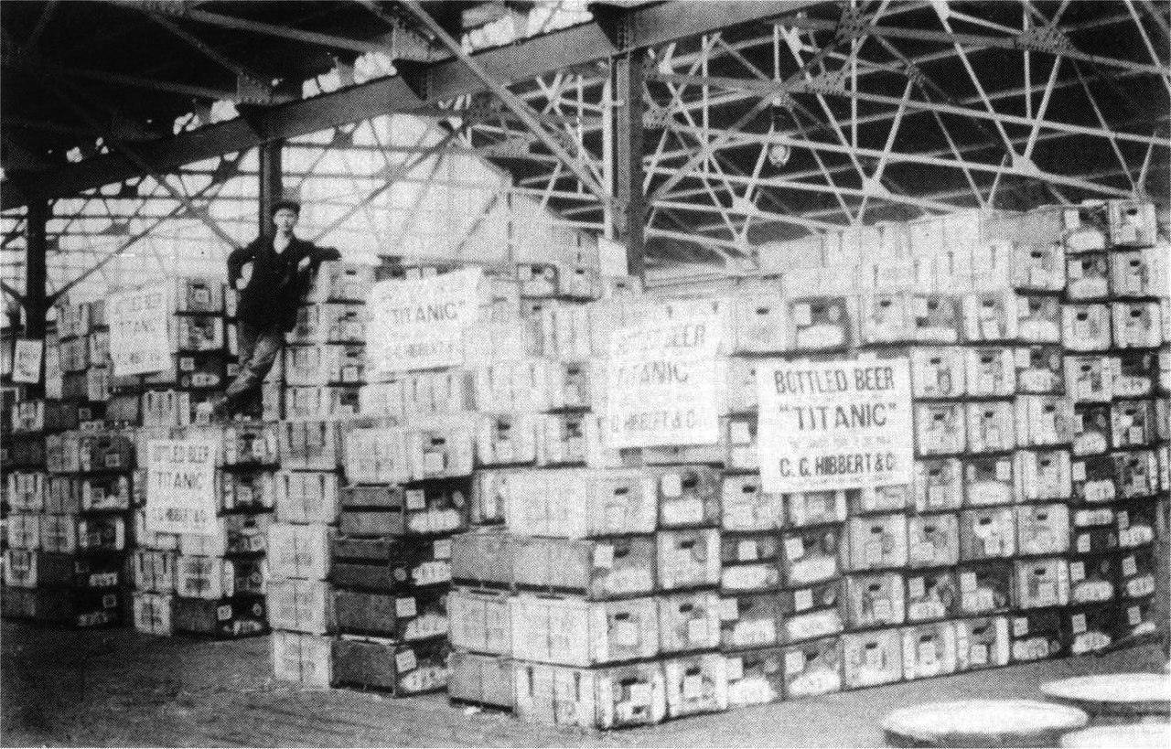 Ящики с 20 000 бутылками пива перед погрузкой на Титаник